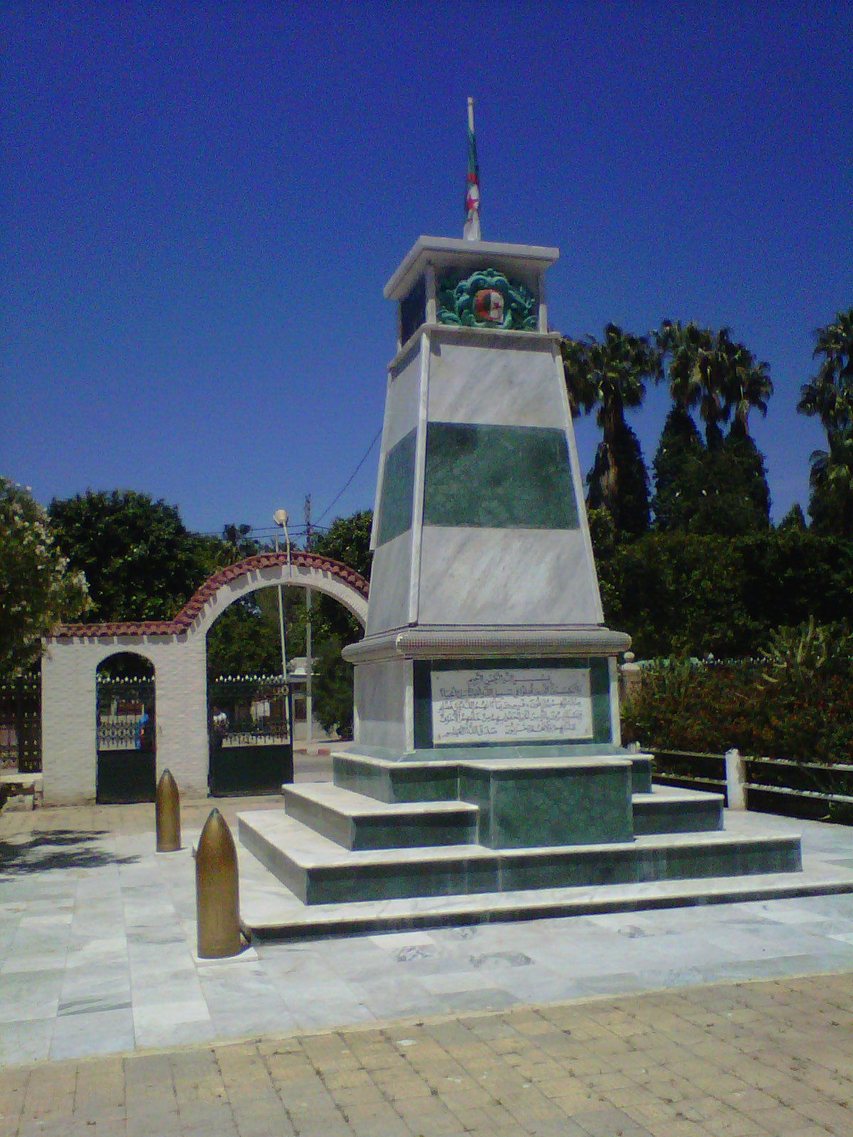 monument aux chouhadas de la revolution 1954